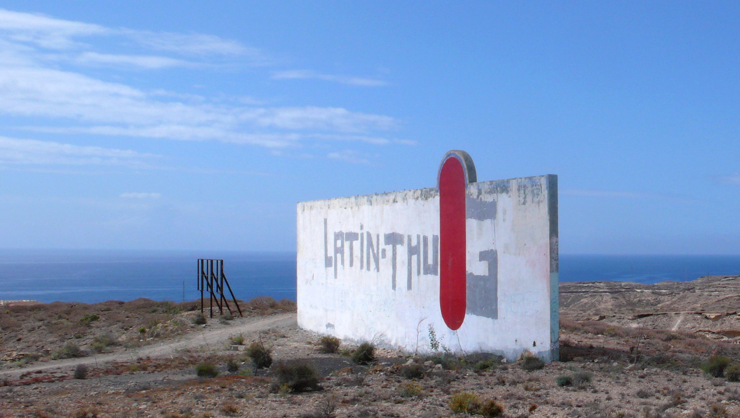 Fotografía de la intervención Reforma VII, de Eberhard Bosslet, 2006, en Arico, isla de Tenerife.